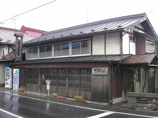 日本宮城県登米市 石ノ森章太郎生家